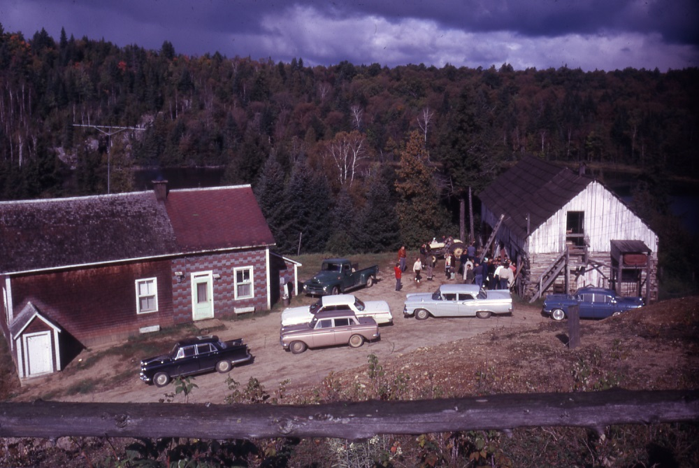 Diapositive couleur illustrant une ferme et ses habitants en automne dans la région administrative de l’Abitibi-Témiscamingue.